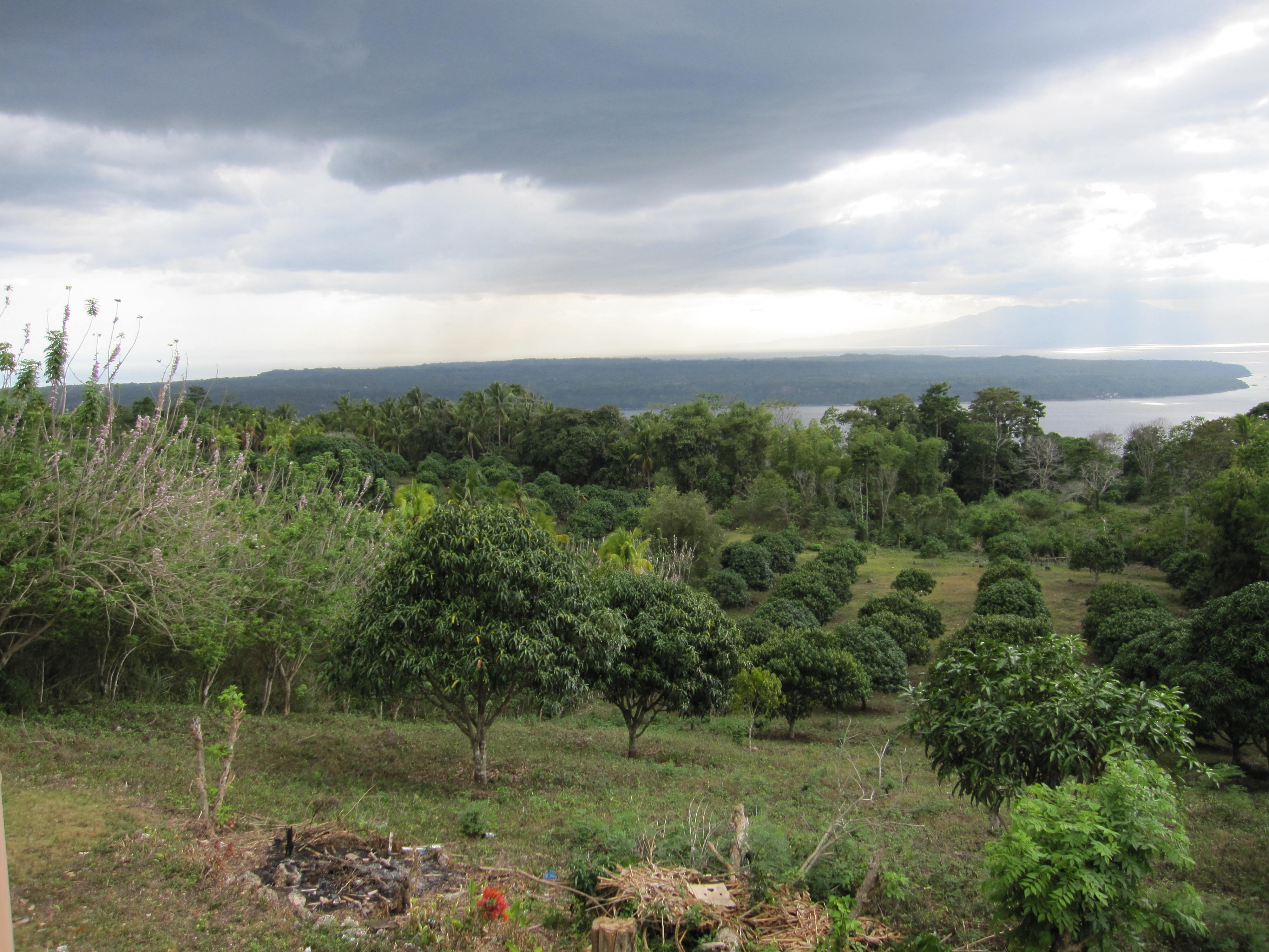 Sagrada Over Looking Kaputian Samal Island